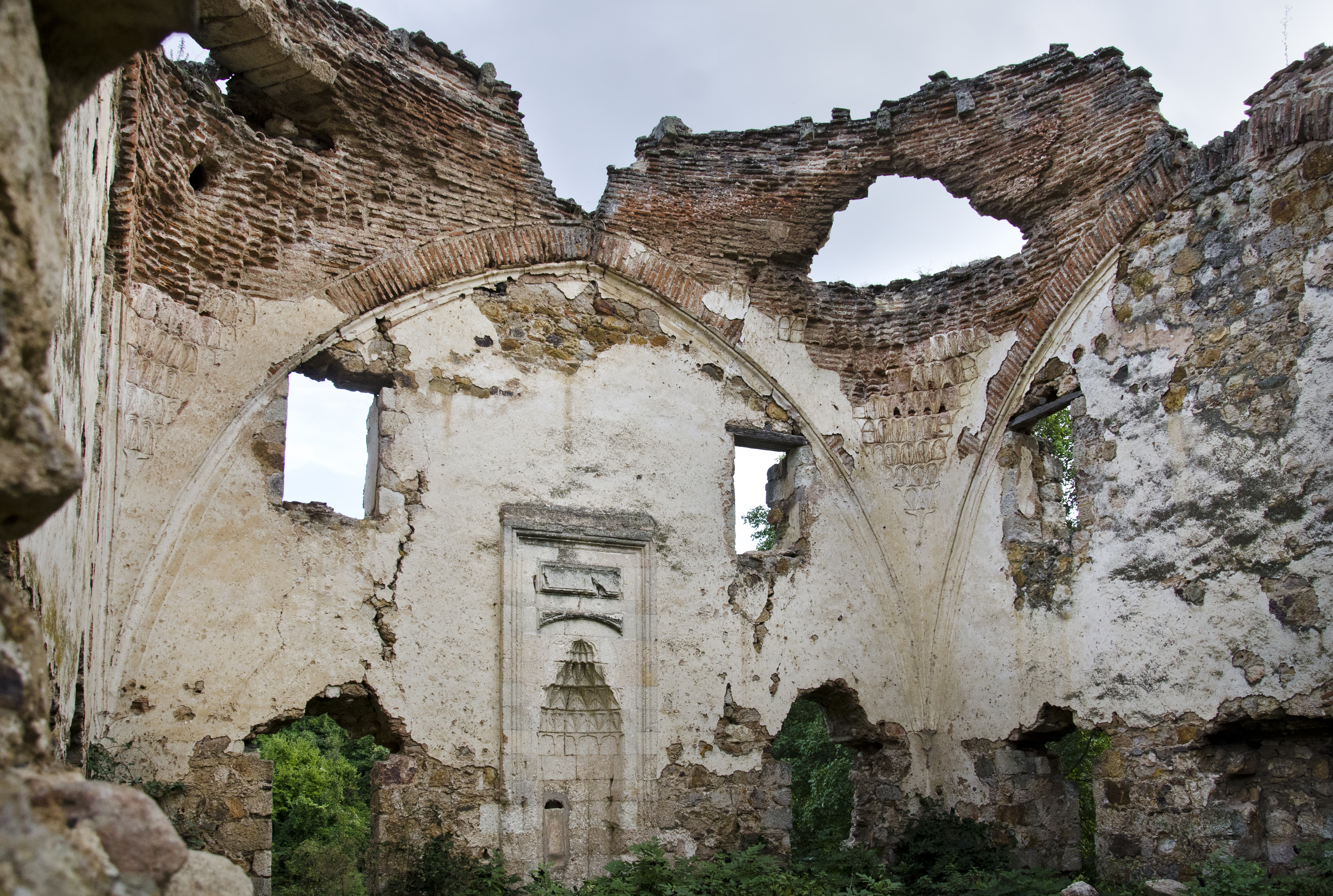 Xhamia e Mazhiqit - Ambienturë